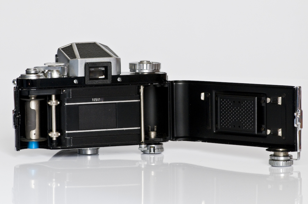 Ihagee Exakta Varex IIb Rückansicht mit geöffneter Rückwand